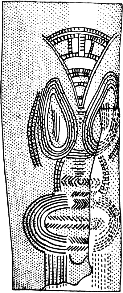 Figura femenina estilizada grabada en una defensa de mamut (marfil). Procede de Predmost (República Checa)